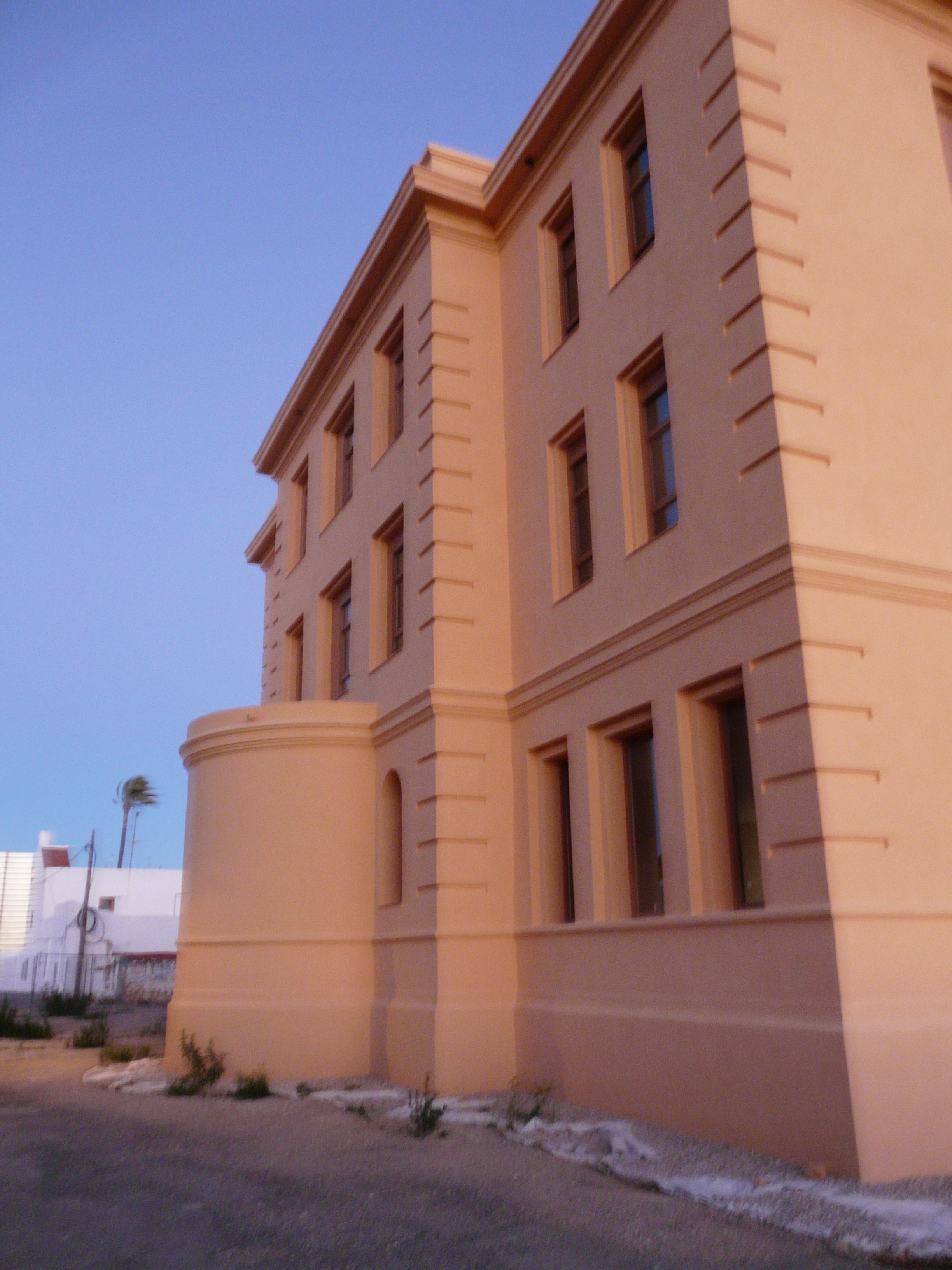 Edifici dels Josepets, Convent dels Josepets. Antiga ctra. de les Cases, les Cases d'Alcanar (Alcanar). Object location40° 33′ 12.88″ N, 0° 31′ 36.46″ E